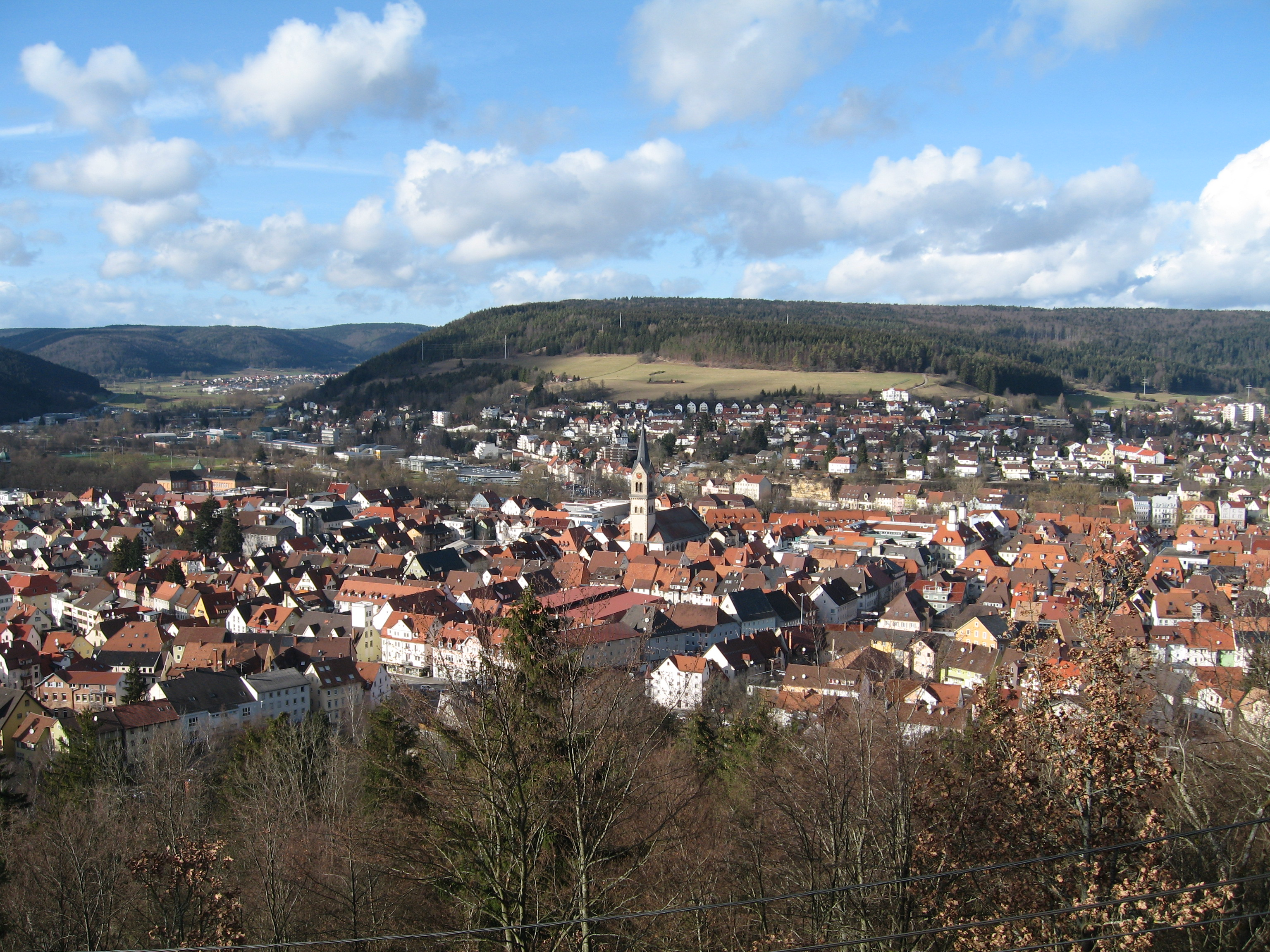 Das Bild zeigt die Tuttlinger Innenstadt - Sicht vom Aussichtspunkt Honberg nordwärts (Bildmitte Turm der ev. Stadtkirche Peter und Paul)